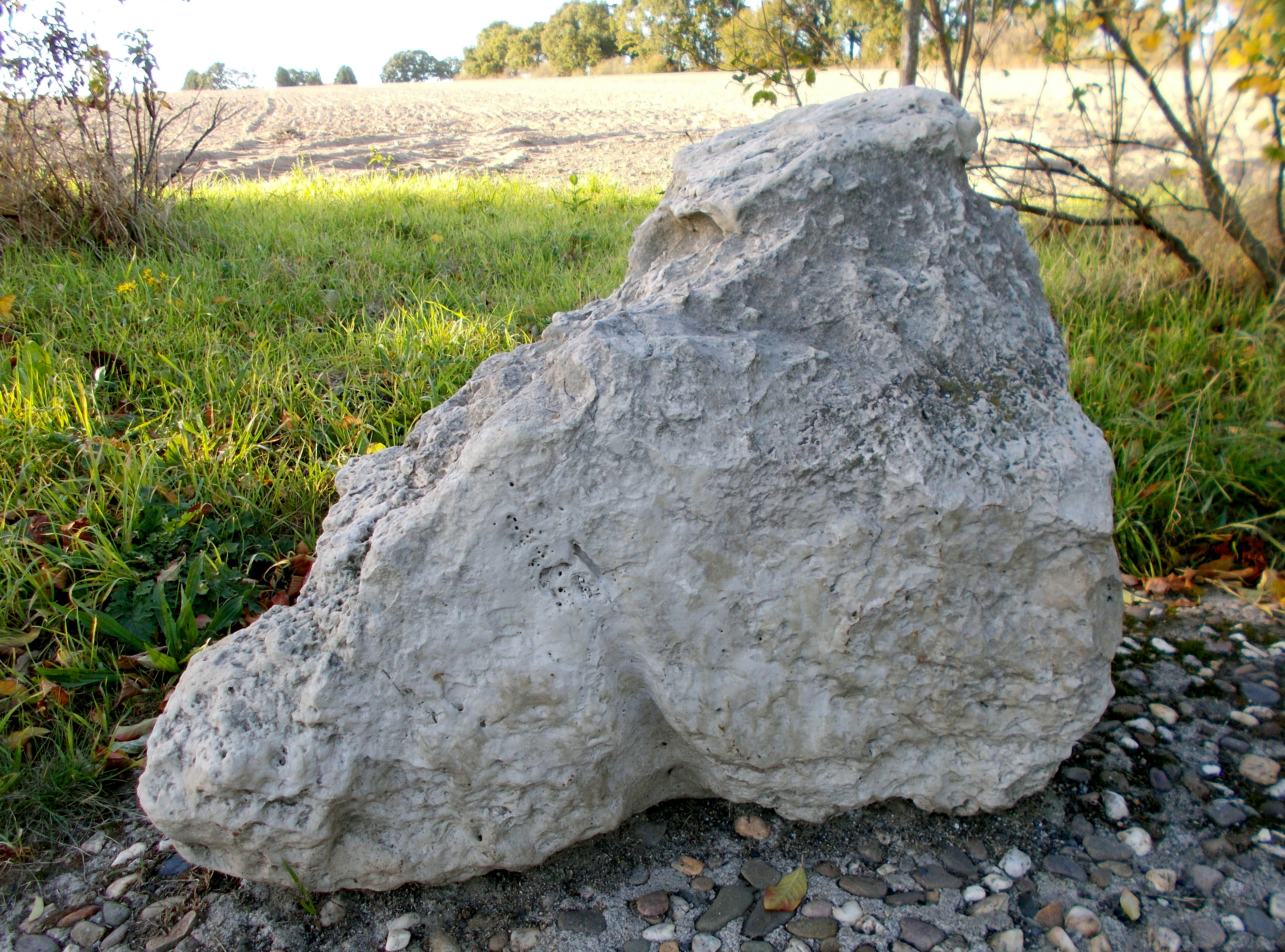 Findlingsweg Sonsbeck Station 4: Quarzitischer Feinsandstein